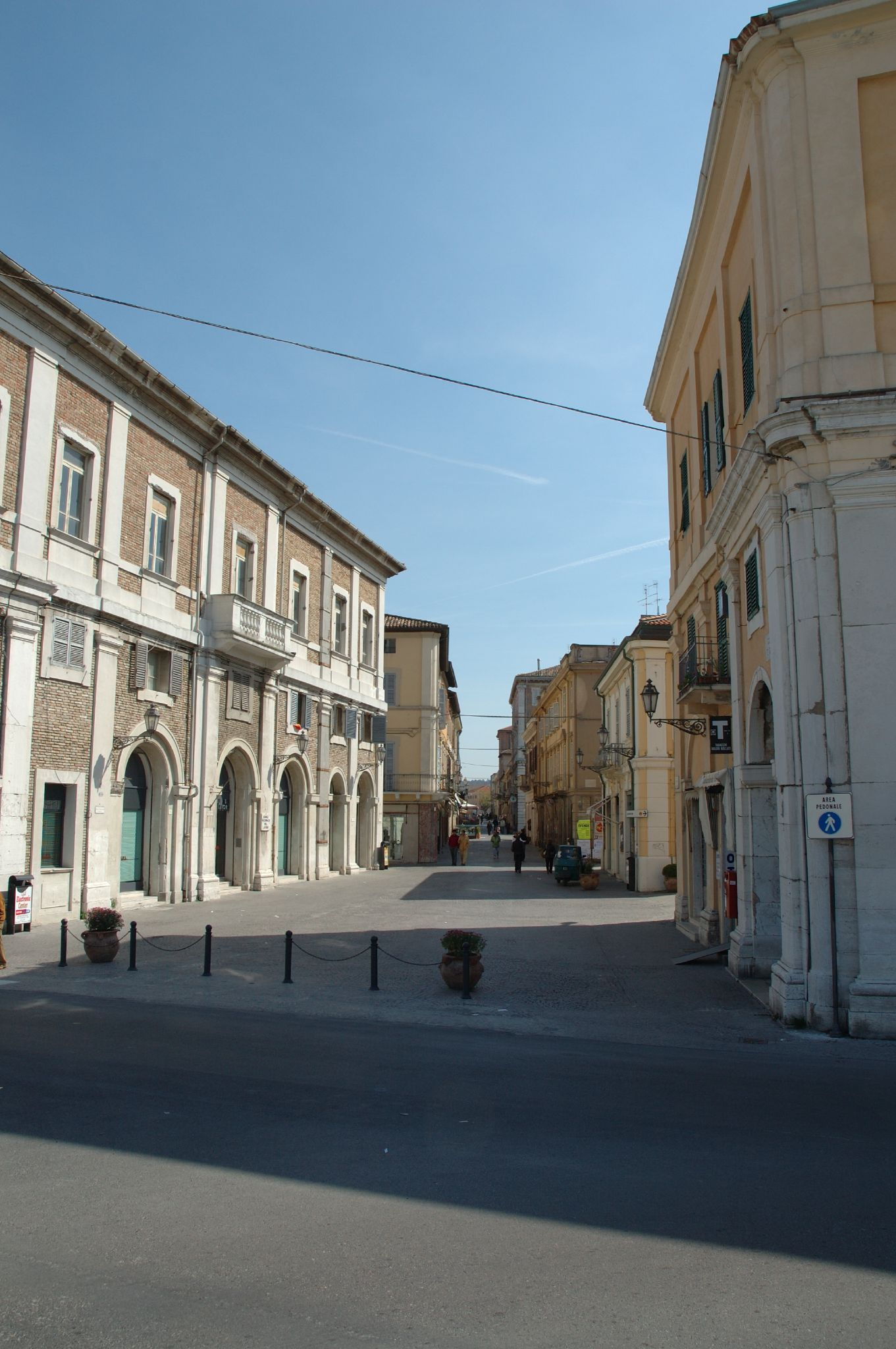 Corso II Giugno a Senigallia, Marche, Italia